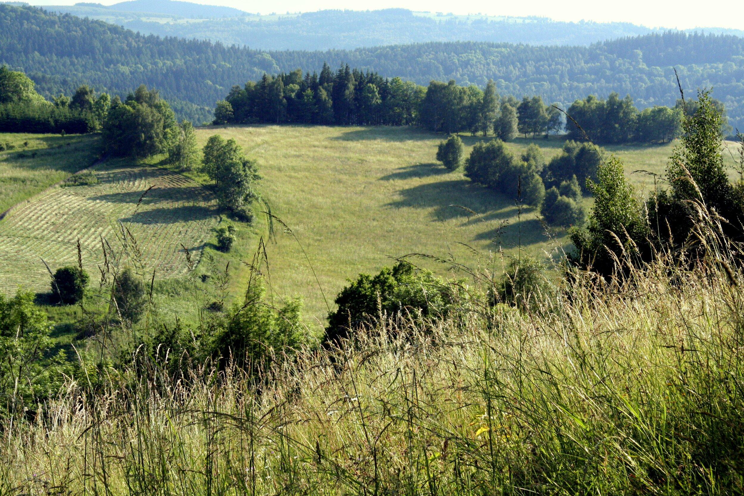 Glatzer Land, Sommerwiese